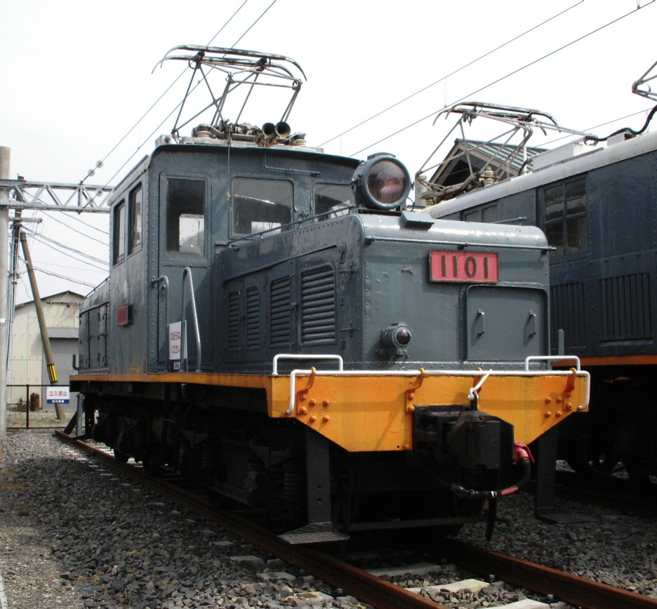 近江鉄道ロコ1000形